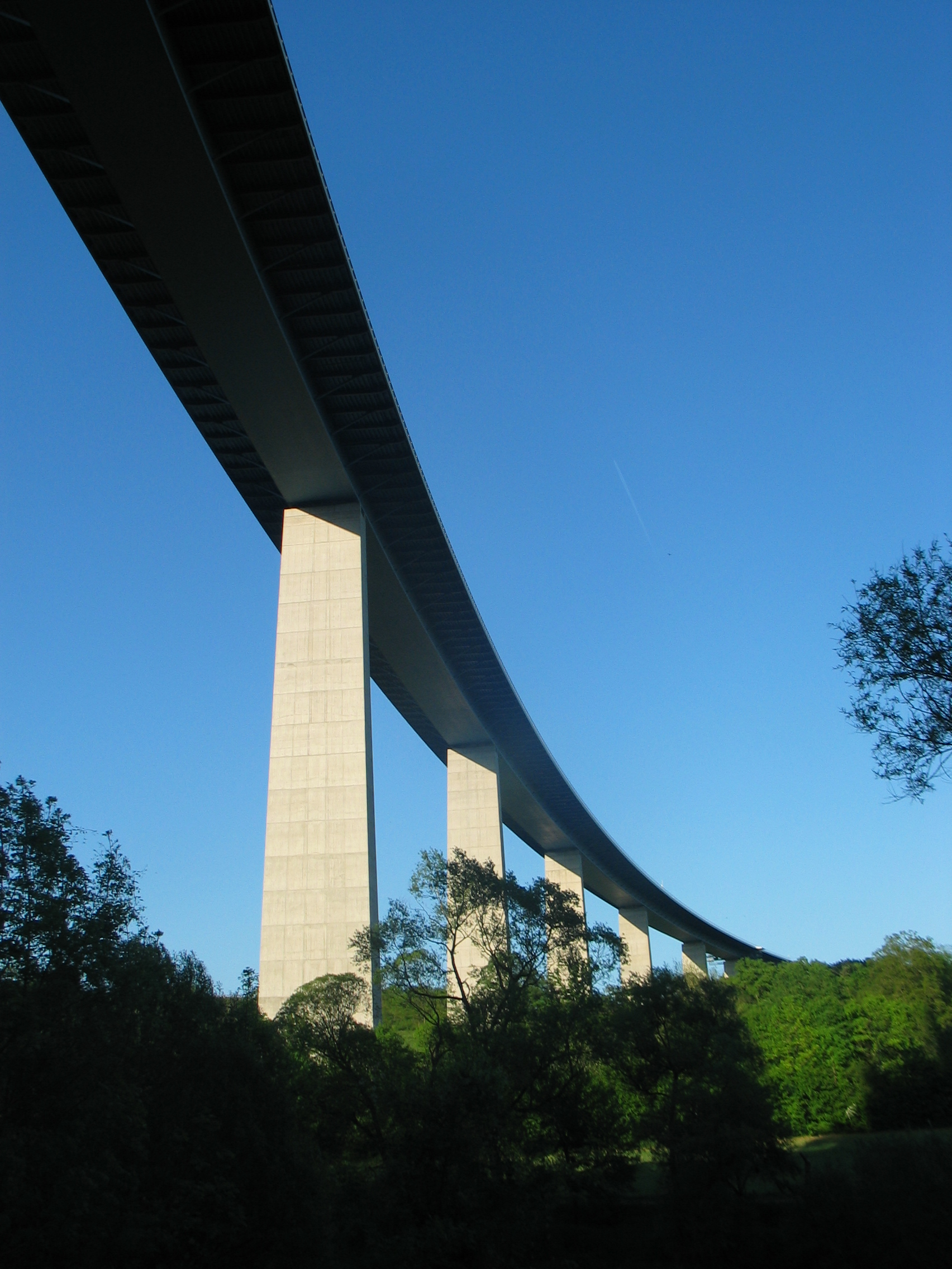 Sauertalbrücke